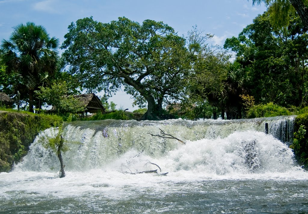 Aldama Tamaulipas Tiene numerosos lugares de Turismo.